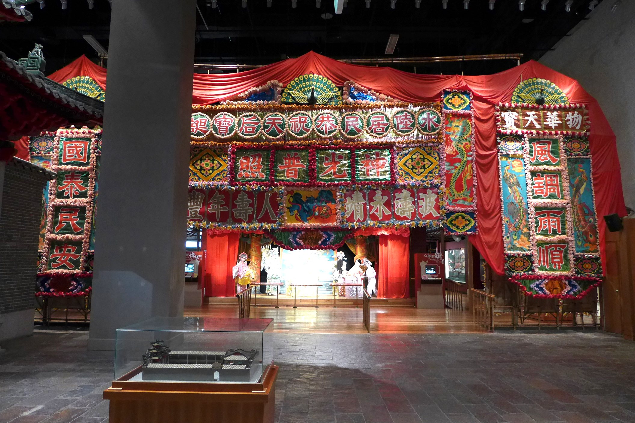 HKHM Cantonese Opera Heritage Hall